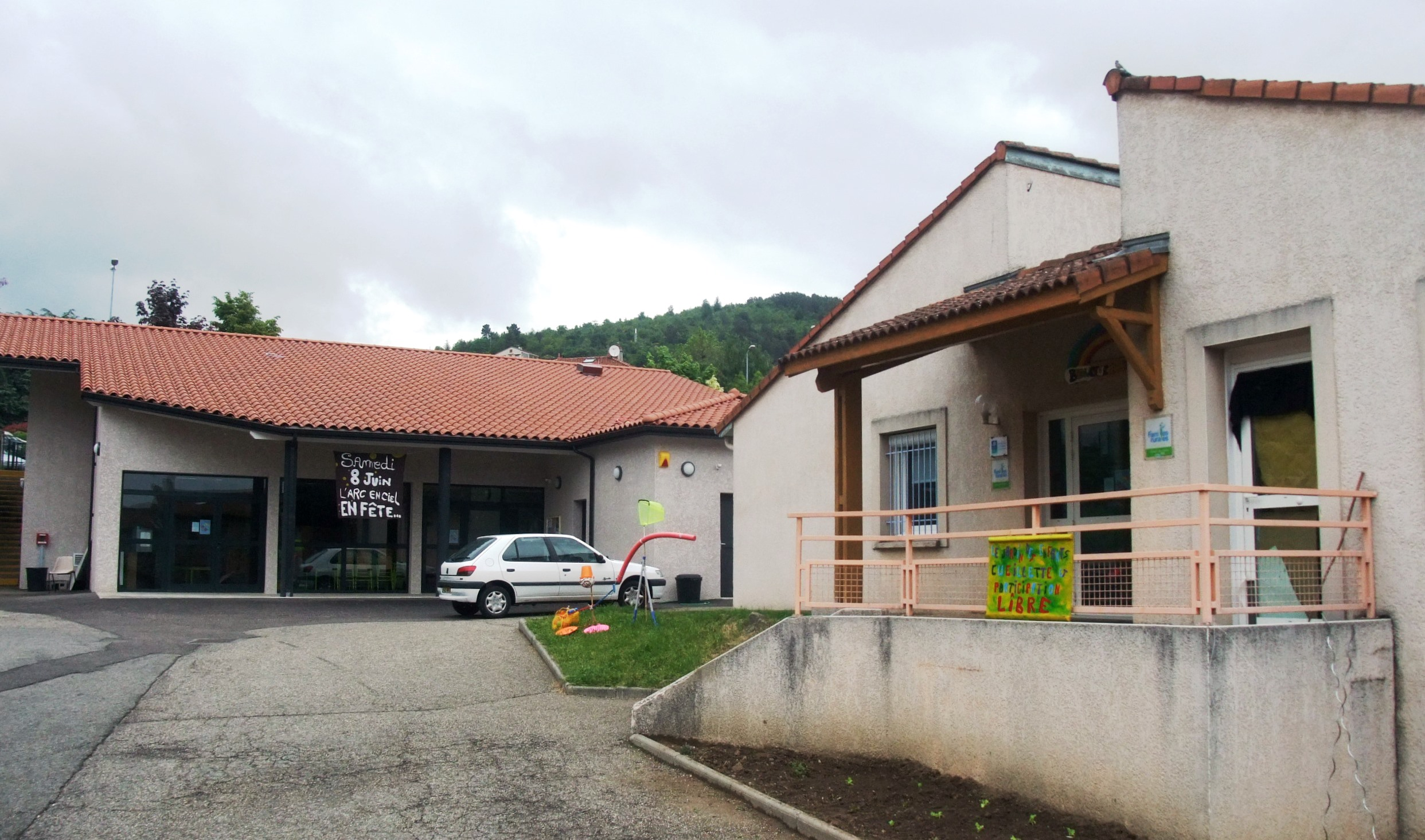 Boulieu Arc en Ciel